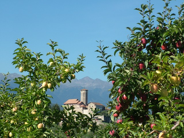 Castel Valer, Tassullo